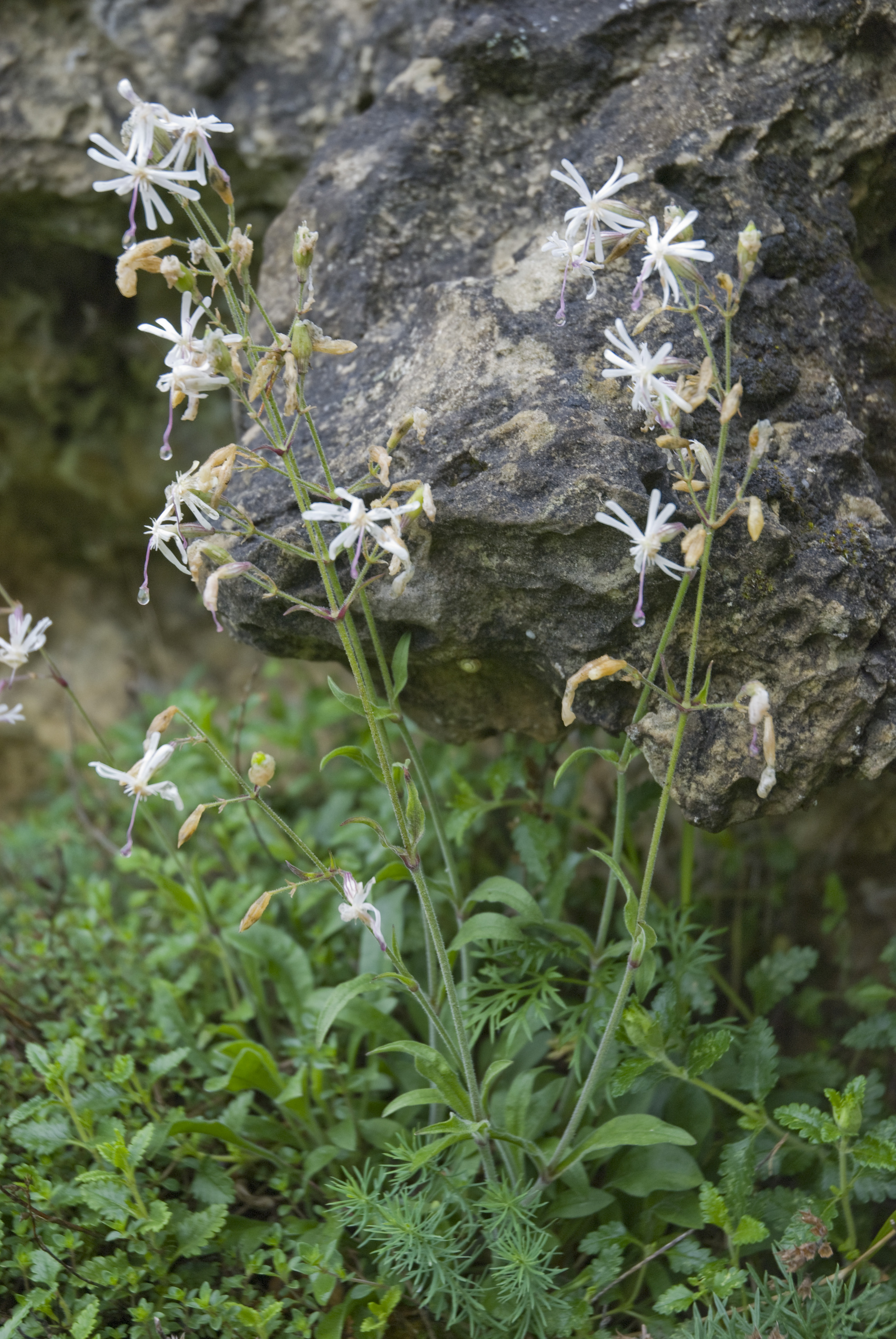 Silene nutans Mont des Veaux à Cessières (Aisne), France